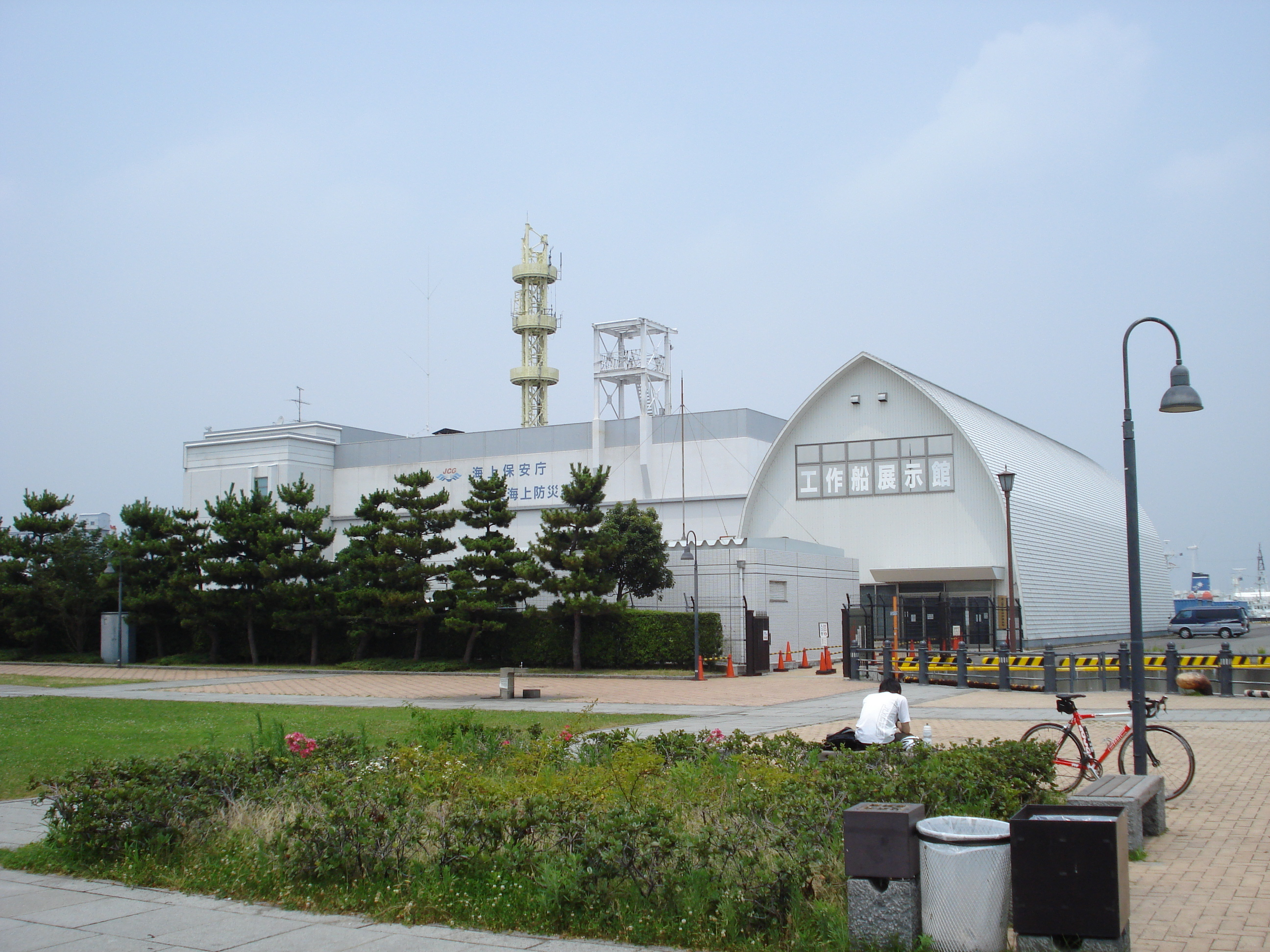 kousaku sen